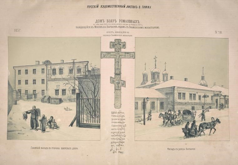 Дом бояр Романовых в Москве в 1857 году (до реставрации). Фасады: дворовый и со стороны Варварки.